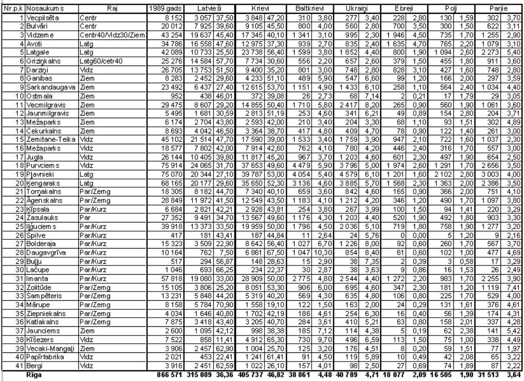 Население Риги 1989 год